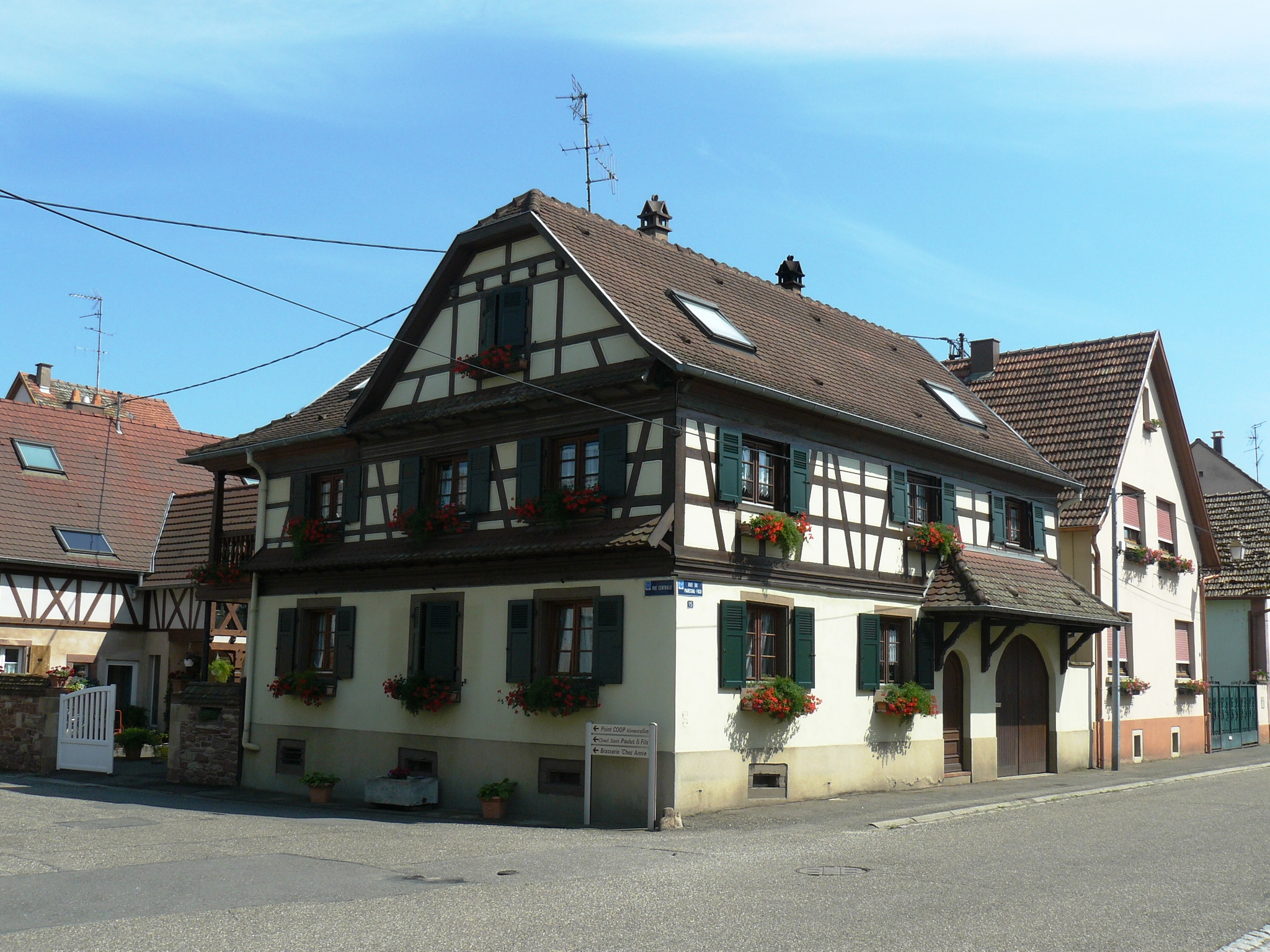 Maison à colombage